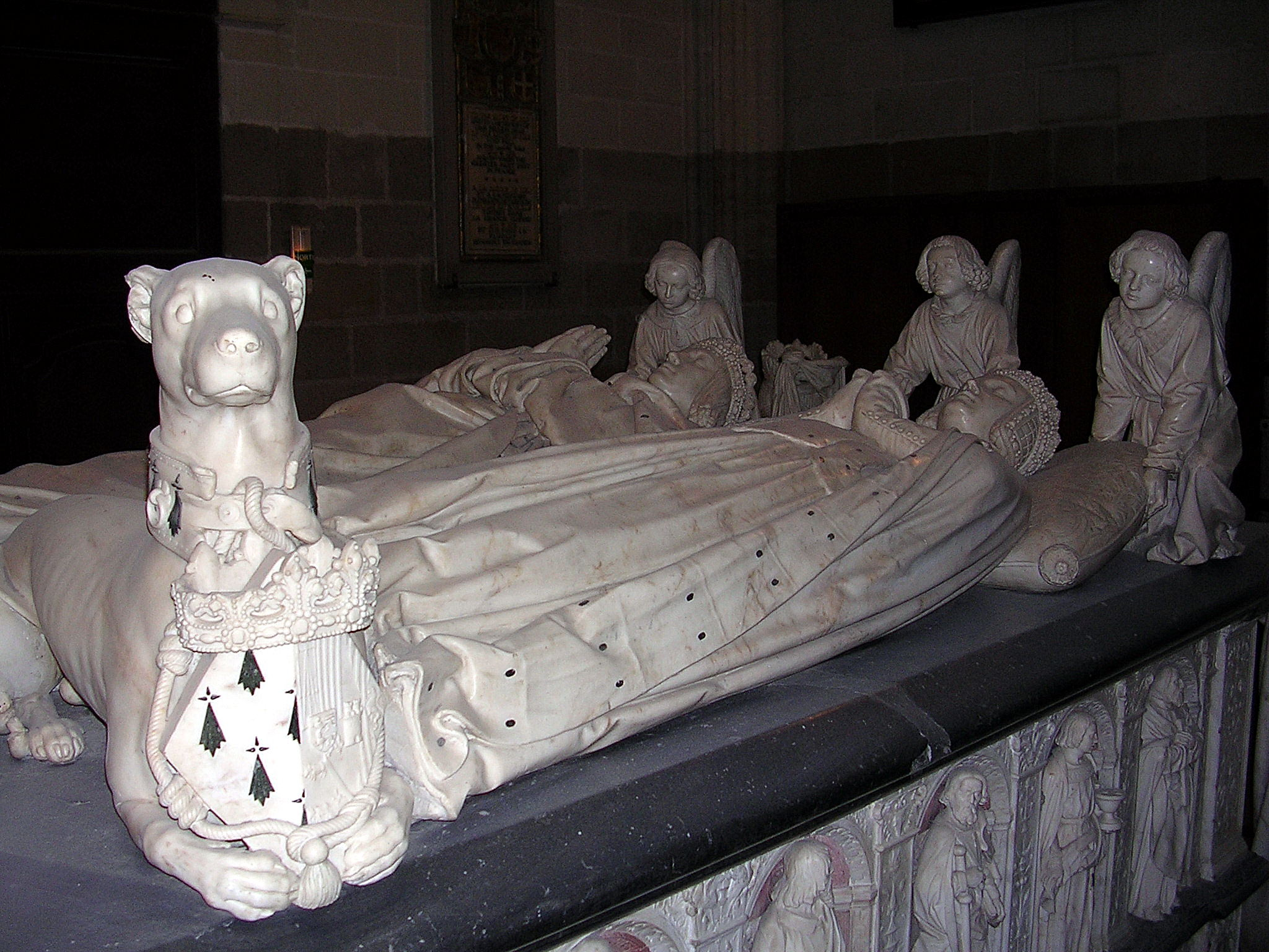 Gisant de François II, cathédrale de Nantes (France). Photo prise par Jibi44